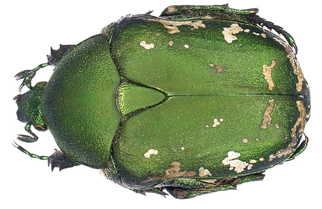 Familie: Scarabaeidae Groesse: 14-20 mm Verbreitung: Südost-Europa, Asien Ökologie: Entwicklung im morschen Holz von Laubbäumen Fundort: Austria, Burgenland, Apetlon leg. H.J.Mager, 1972; det. Gfeller Photo: U.Schmidt, 2005